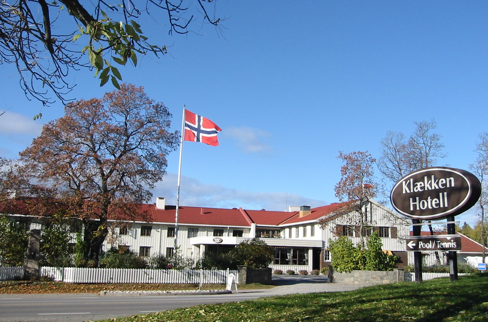 Klækken hotell, Ringerike, Norway